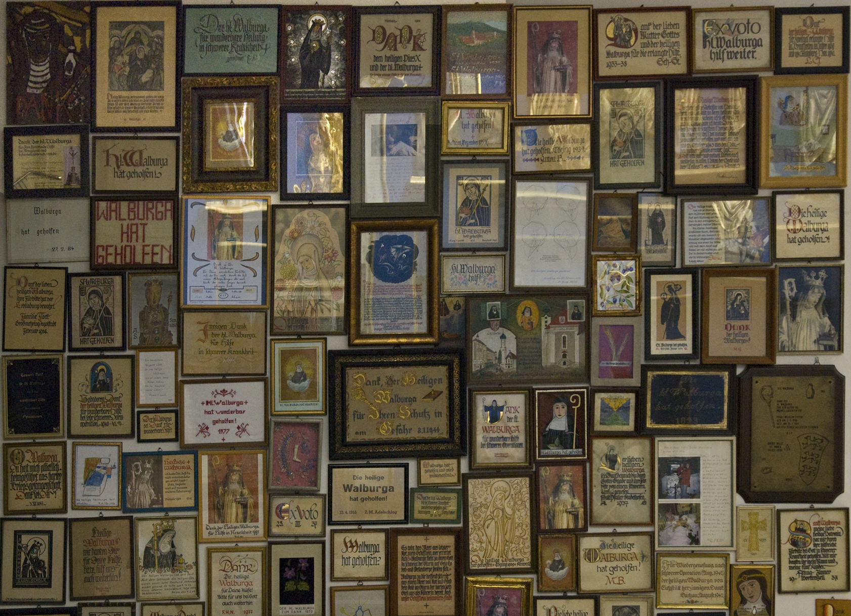 Kloster St. Walburg - Eichstätt - Mit der Heiligen Walburga hat eine der beliebtesten europäischen Volksheiligen ihre letzte Ruhestätte gefunden - in der Klosterkirche St. Walburg. Auf den über 1.200 Votivtafeln in ihrer Gruftkapelle steht unzählige Male ... “Walburga hat geholfen“ ...This is a photograph of an architectural monument.